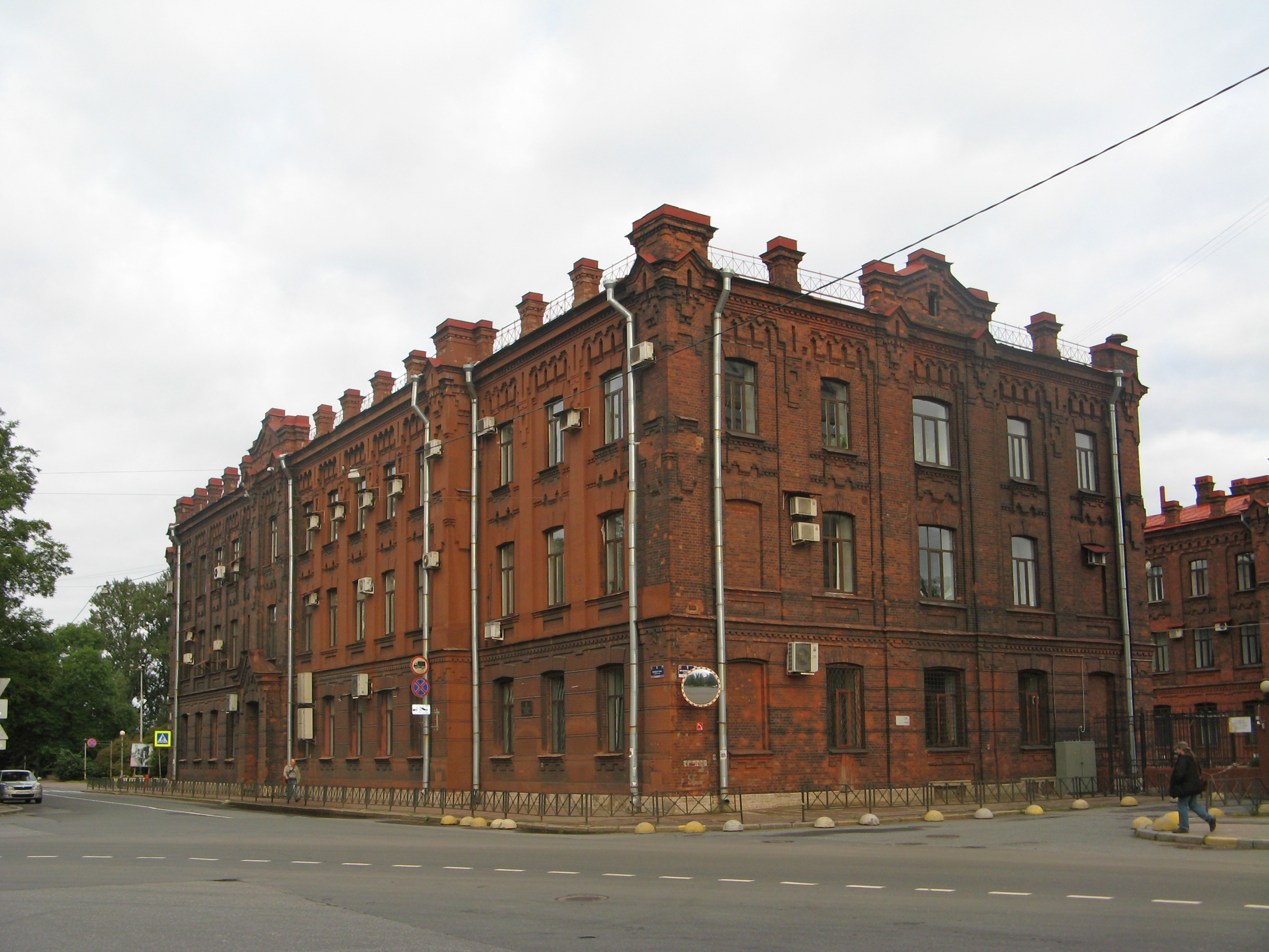 Здание портовой таможни: Межевой канал, 5, Кировский район, Санкт-Петербург